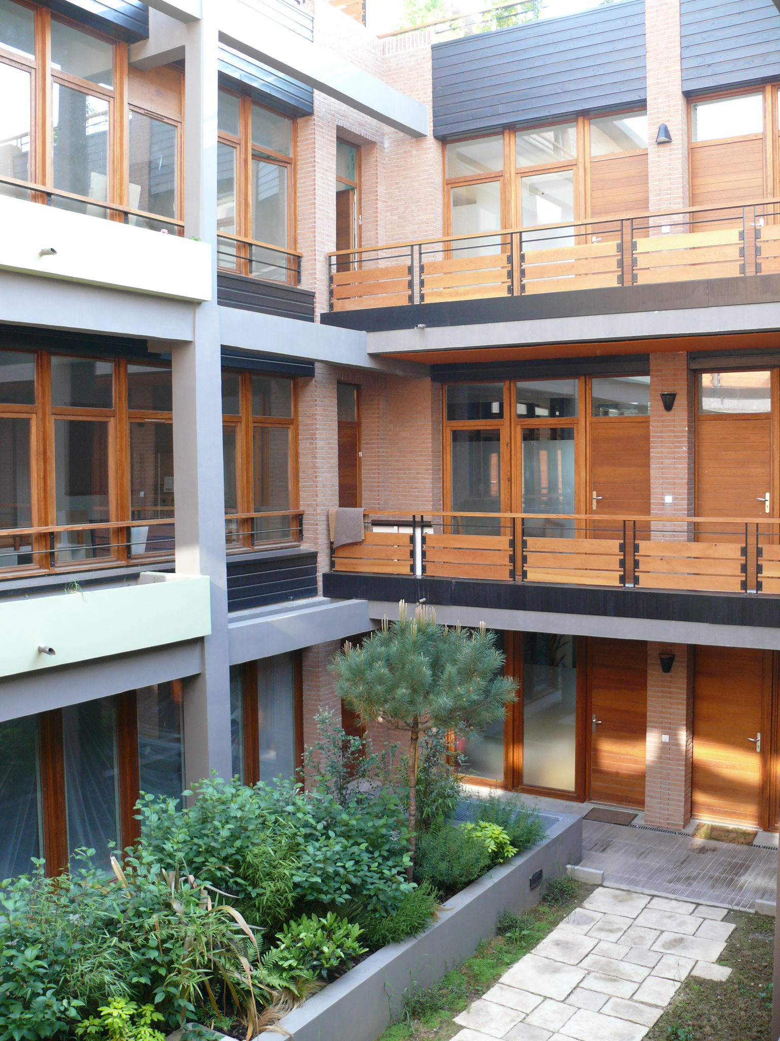 Ancien bâtiment d'activité, avenue du Président Wilson (RN1) à Saint-Denis (Seine-Saint-Denis - Île-de-France - France) en fond de parcelle aveugle, transformé en logements en accession à la propriété éclairé par un large puit de lumière